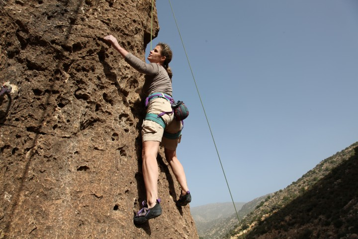 20 ans après, Isabelle retrouve l'escalade